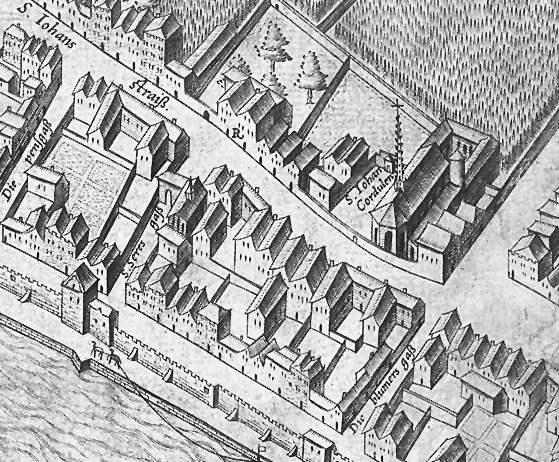 Johannisstraße, Kirche St. Johann und Cordula. Links von dieser der Clever Hof in Köln. Ausschnitt aus dem Plan der Stadt Köln von Arnold Merkator aus dem Jahre 1571